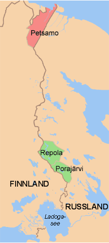 Frieden von Dorpat - nach Treaty-of-Tartu.png, ursprünglich erstellt von User:Jniemenmaa; von Benutzer:Janneman eingedeutscht.